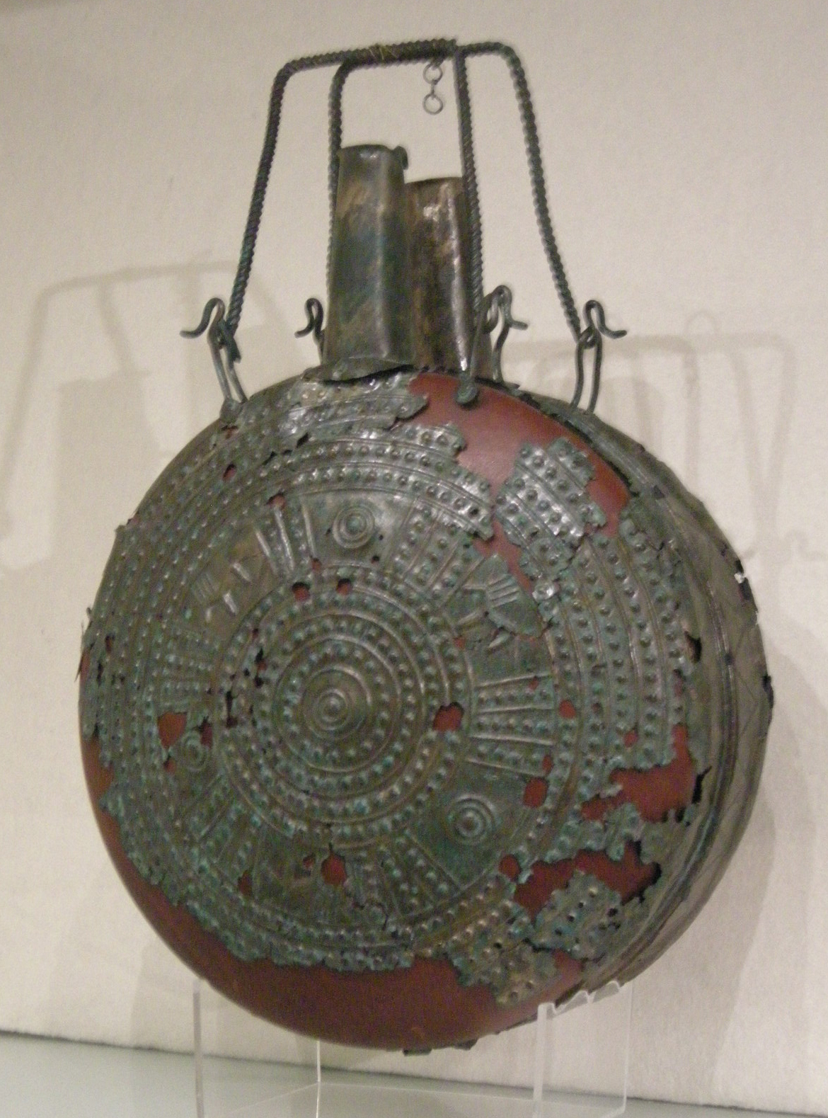 Museo guarnacci, tomba del guerriero di poggio alle croci, doppia fiasca